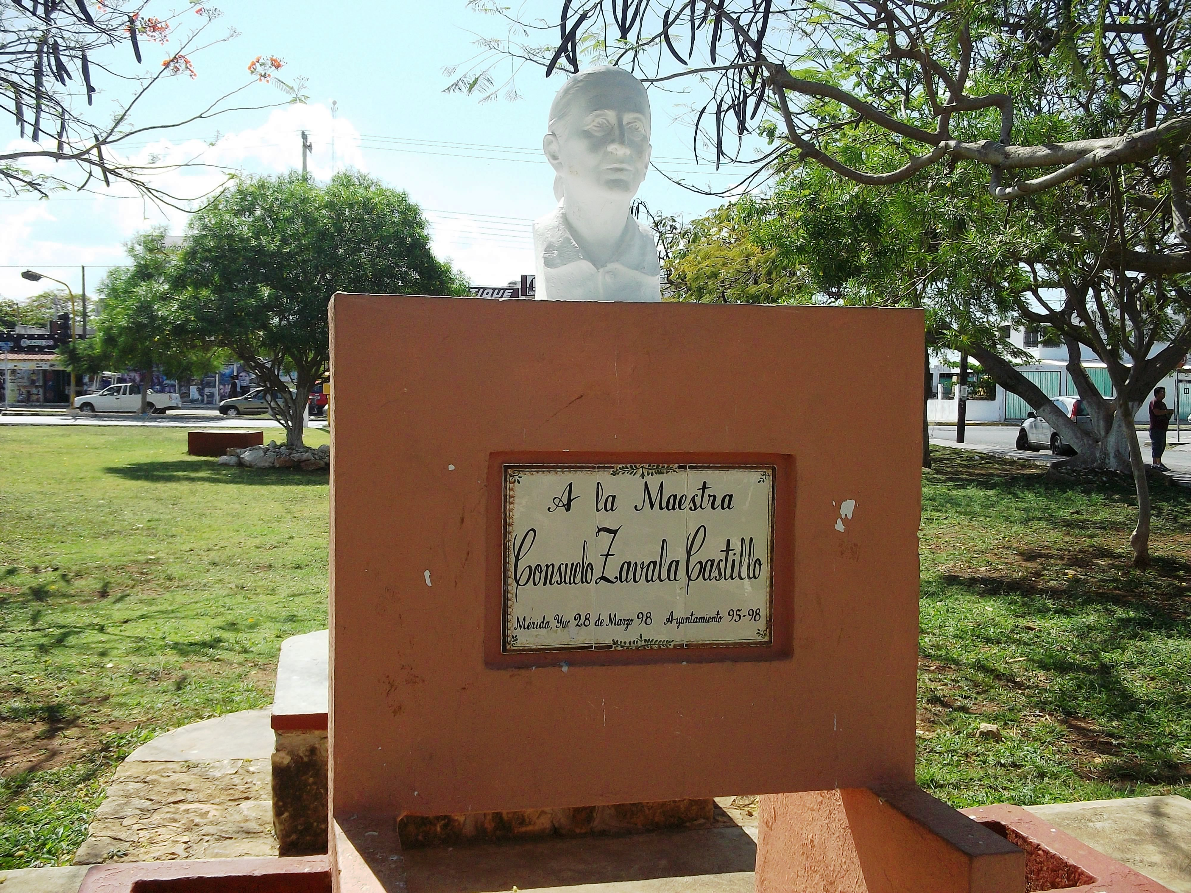 Busto de Consuelo Zavala Castillo, Mérida, Yucatán.